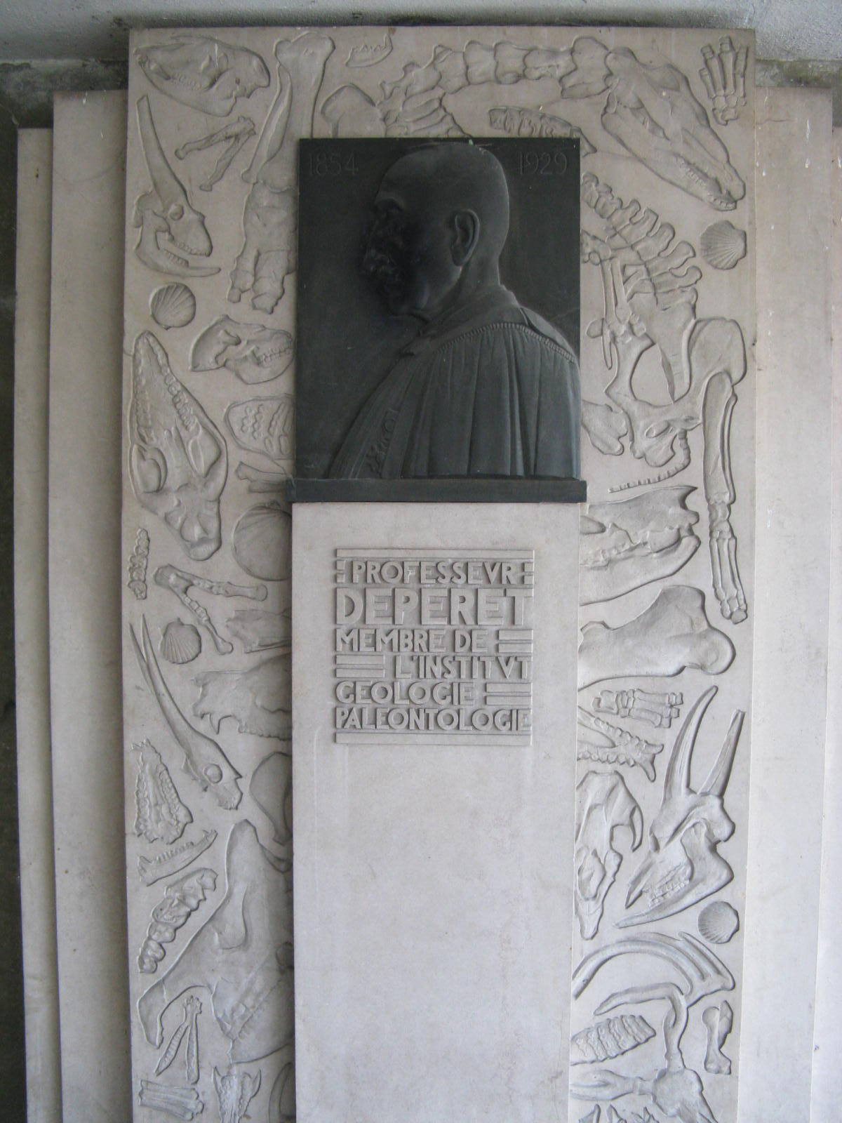 Stèle sur le campus de la Doua à Villeurbanne en l'honneur de Charles Depéret (1854-1929), membre de l'Institut géologie et paléontologie.